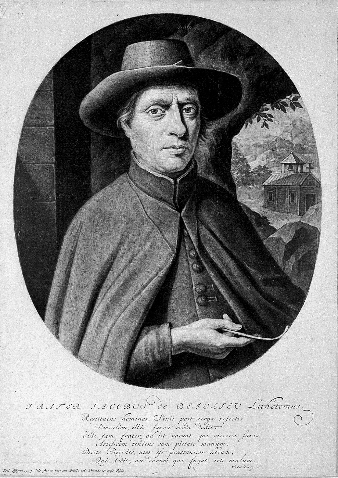 Jacques Baulot Iconographic Collections Keywords: frere jacques; lithotomist; Jacques Baulot; J. Cole; Jurriann Pool